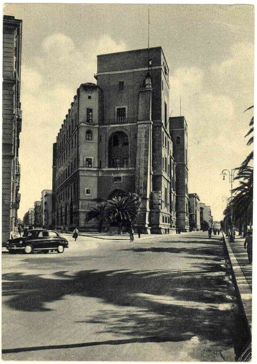 TA Taranto lungomare e Palazzo del Governo